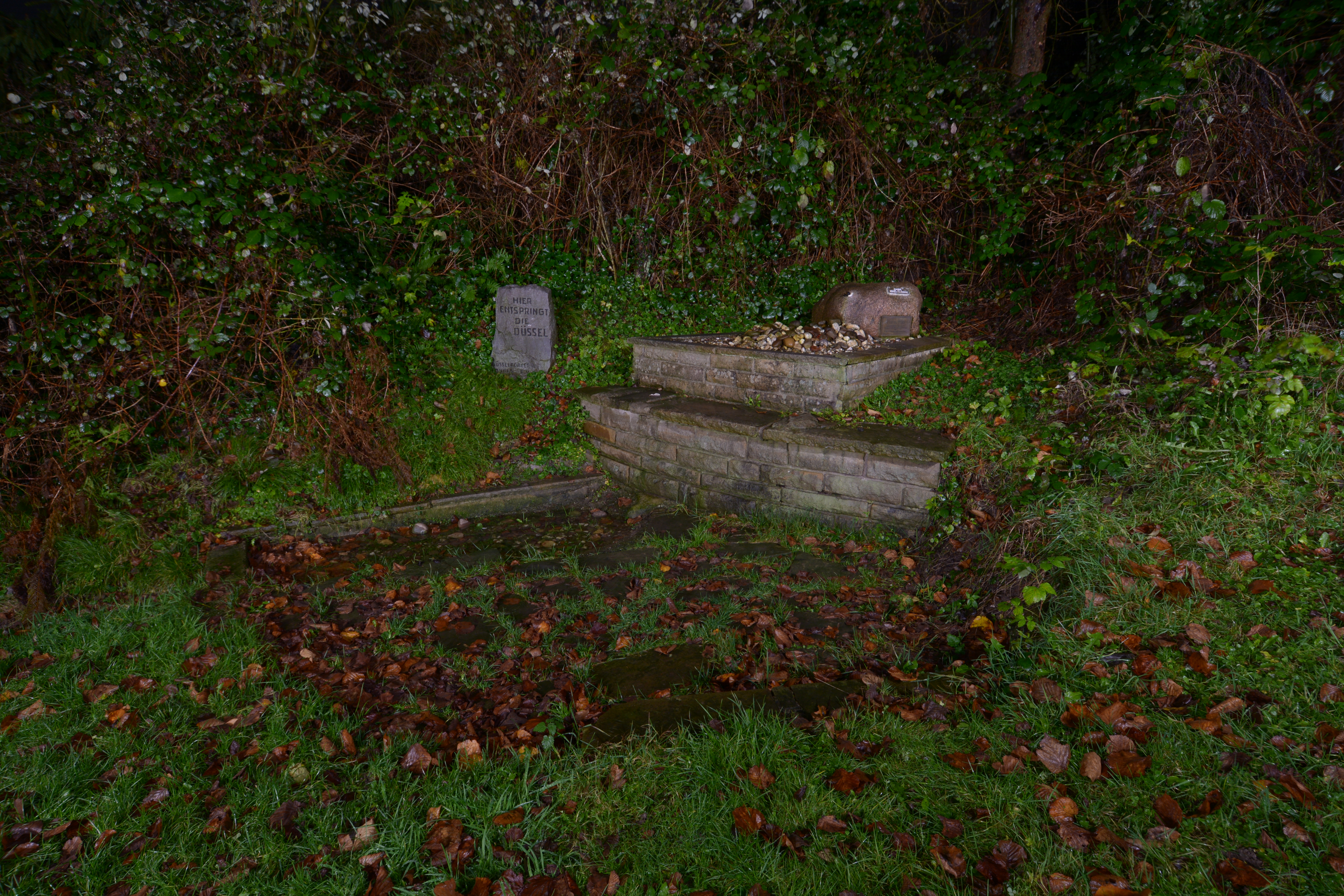 Quelle der Düssel in Wülfrath